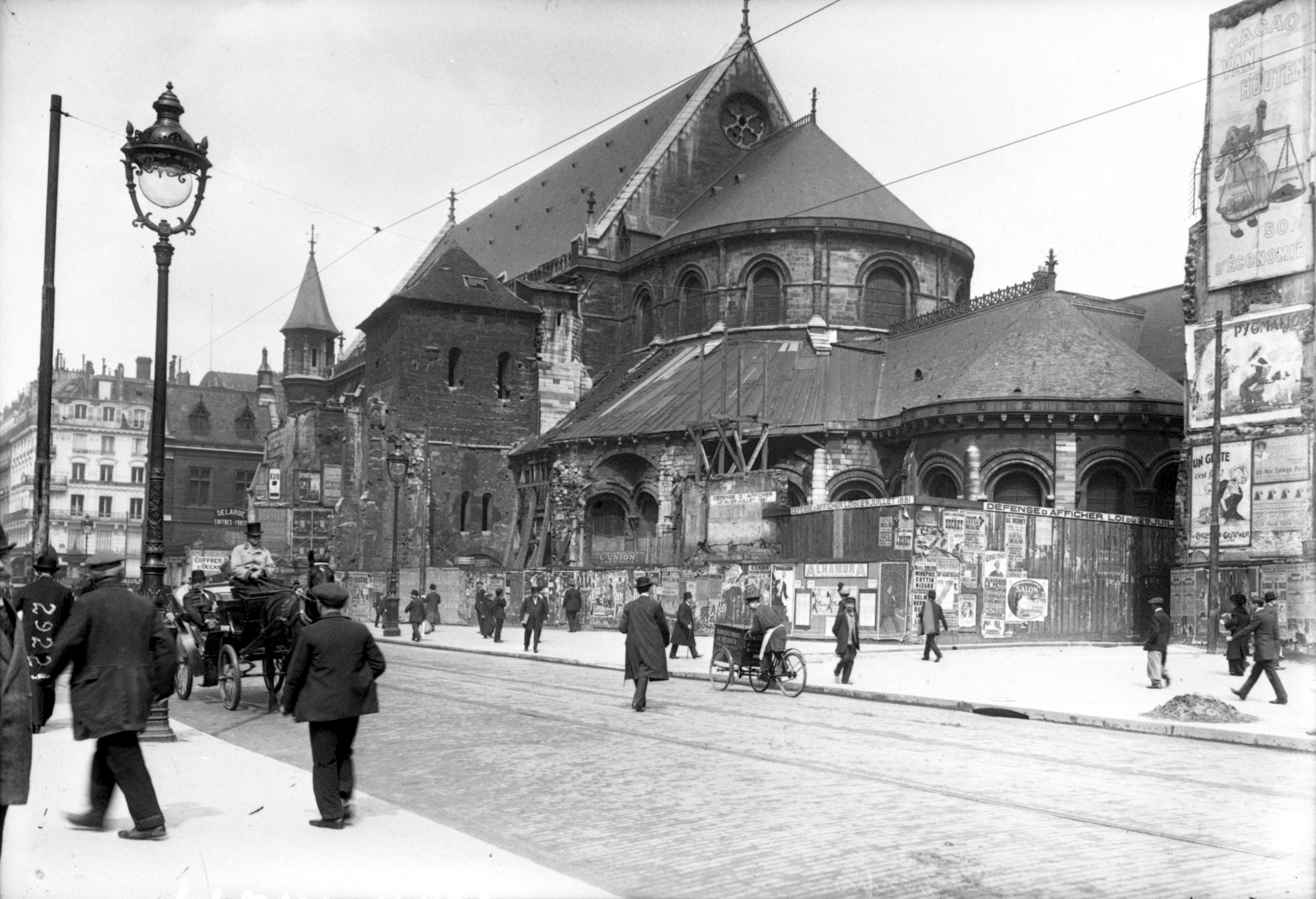 Prieuré Saint-Martin-des-Champs, chevet de l'église en 1913, avant la restauration par Henri Deneux.